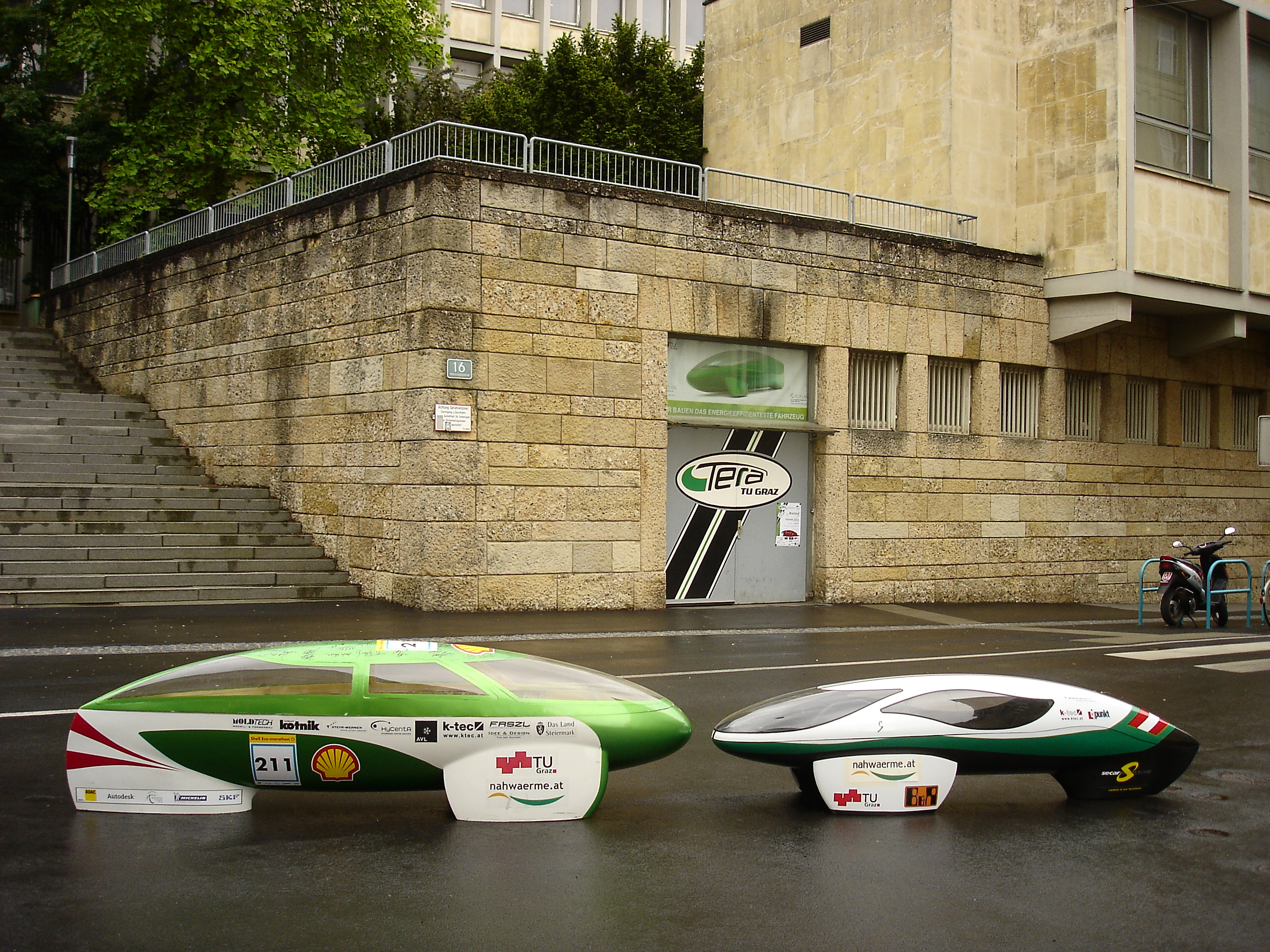 Der Fennek 2010 (links) und sein Nachfolger, der Fennek 2011, vor der Werkstatt des TERA TU Graz.